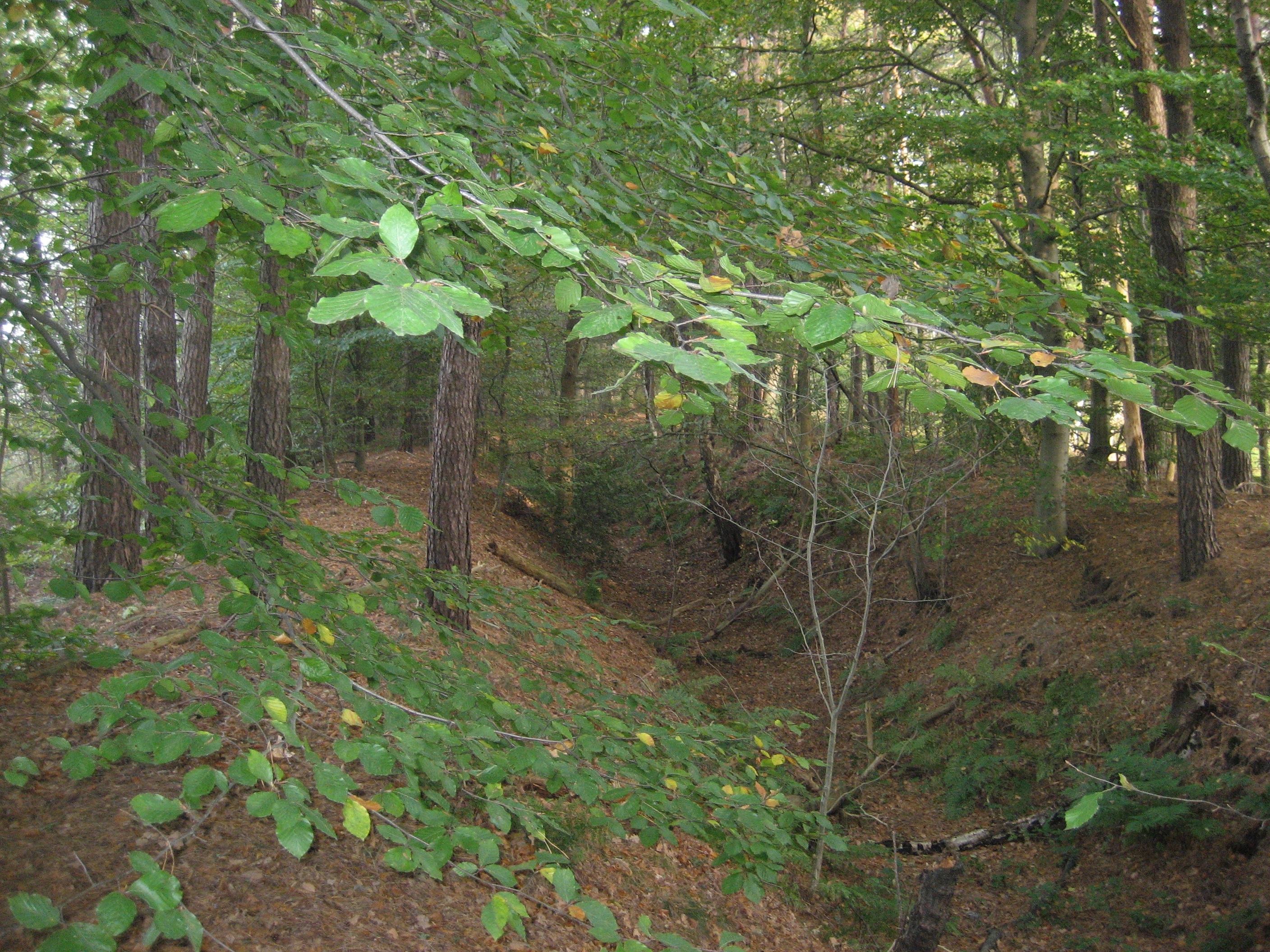 Klever Landwehr, bei Drevenack Peddenberg